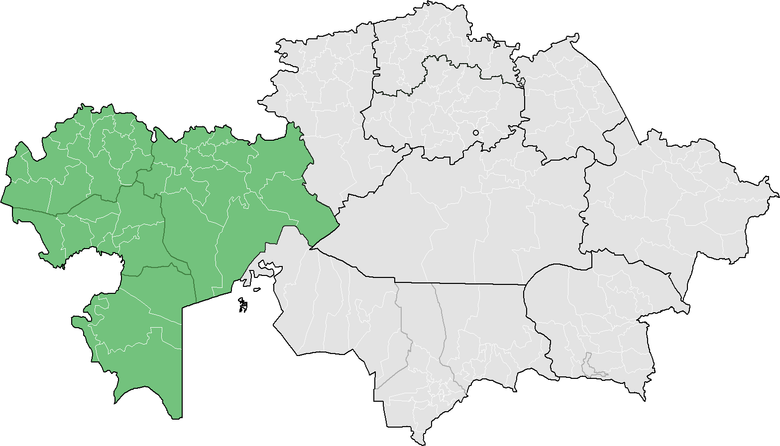 Уральская и Гурьевская епархия